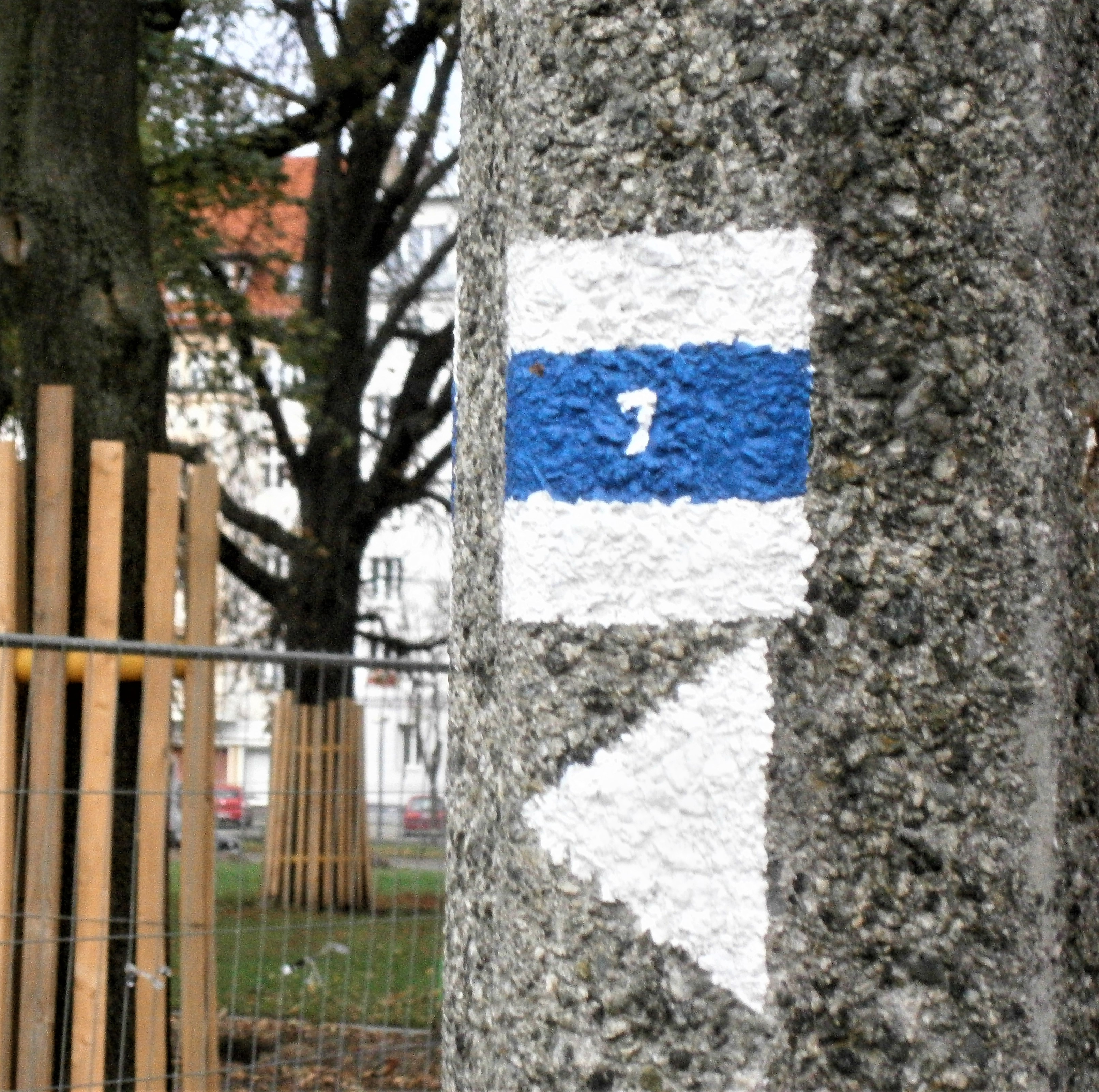 Mit der Zahl 7 ist der Hönower Weg als einer der 20 grünen Hauptwege Berlins markiert. Diese Markierung befindet sich am Mast einer Straßenlaterne in der Hans-Otto-Straße im Ortsteil Prenzlauer Berg des Berliner Bezirks Pankow am Ostrand des Arnswalder Platzes.